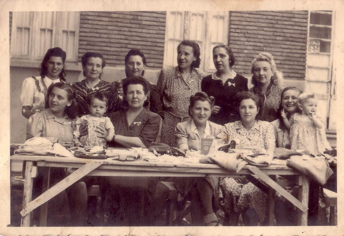 העקורים במחנה העקורים גרוליאסקו